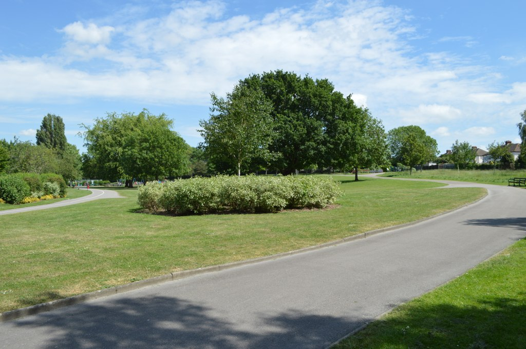 Lodge Farm Park